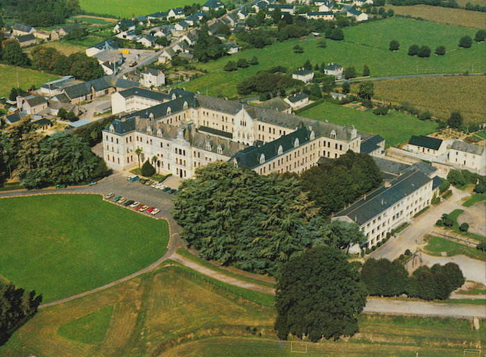 Le collège en 1984